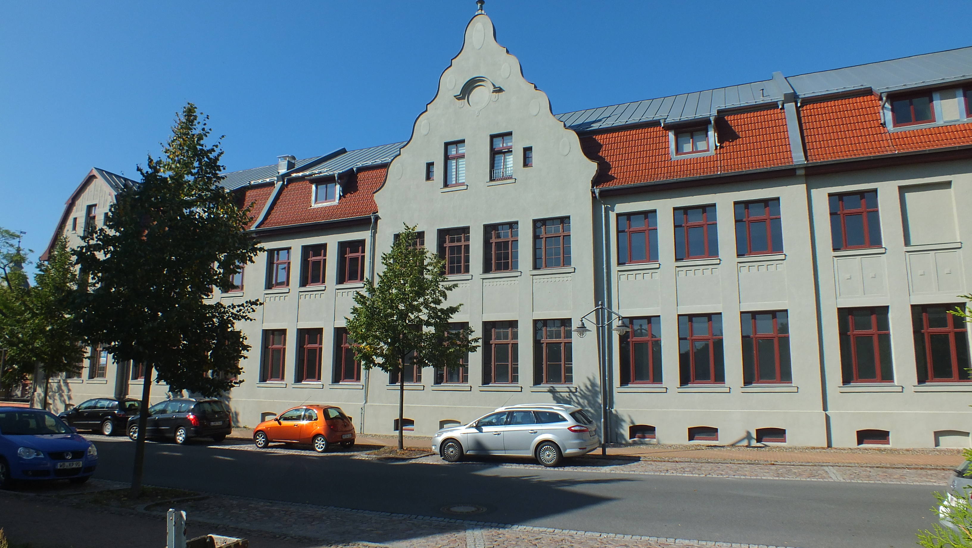 Fuhrmannsche Fabrik in Jessen (Elster)